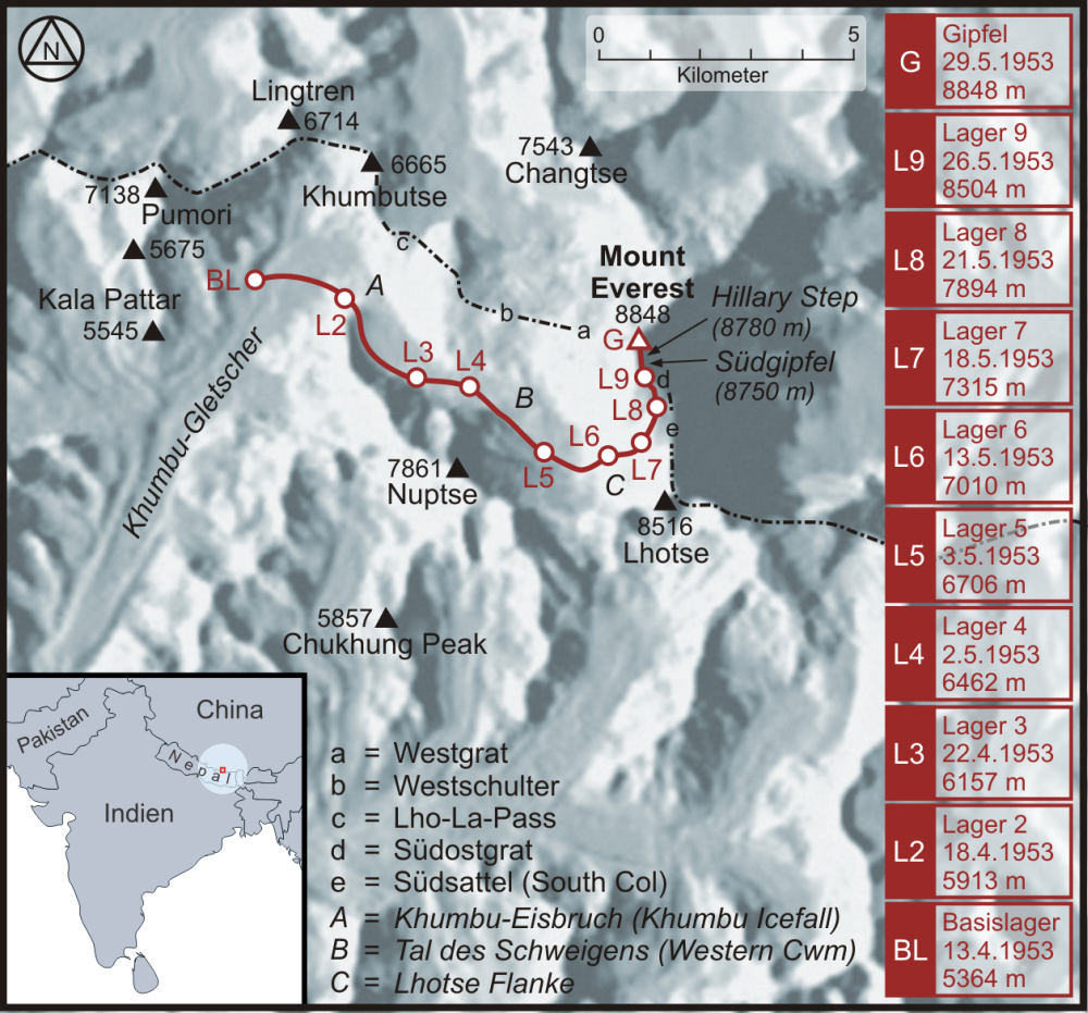 Karte der Route der Erstbesteigung des Mount Everest durch Edmund Hillary und Tenzing Norgay